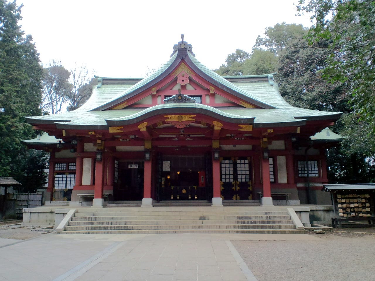 世田谷八幡宮